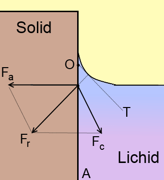 Adhesion